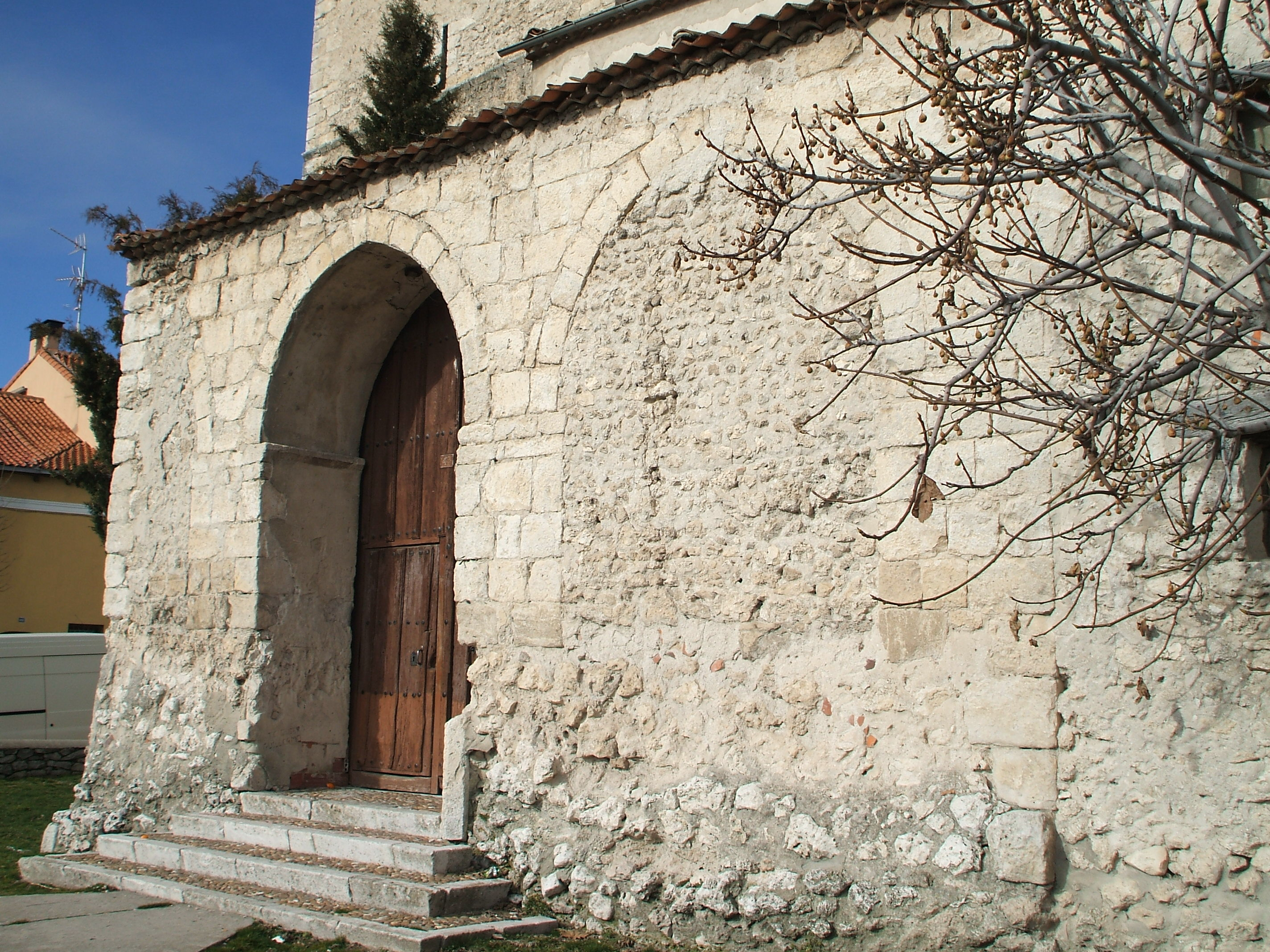 Pórtico de la iglesia de El Salvador (Cuéllar)